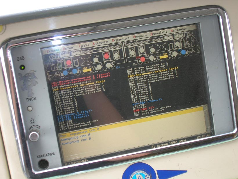 Монитор МСУД электровоза ДЭ1МСУД в режиме поиска неисправностей